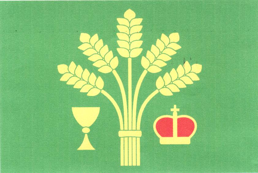 Vlajka obce Vysoká (okres Mělník)